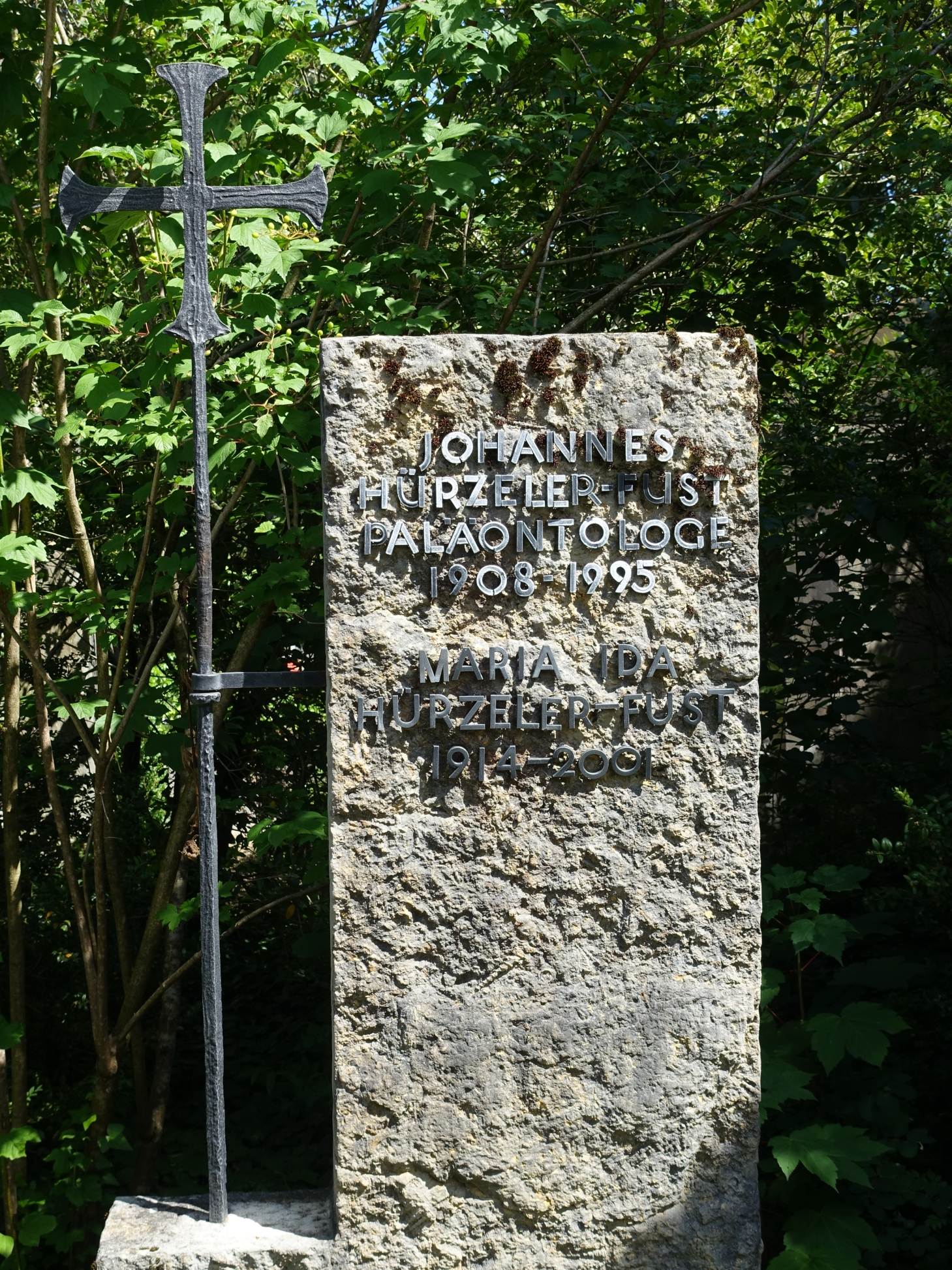 Johannes Hürzeler-Fust (1908–1995) Paläontologe. Grab auf dem Friedhof Wolfgottesacker, Basel